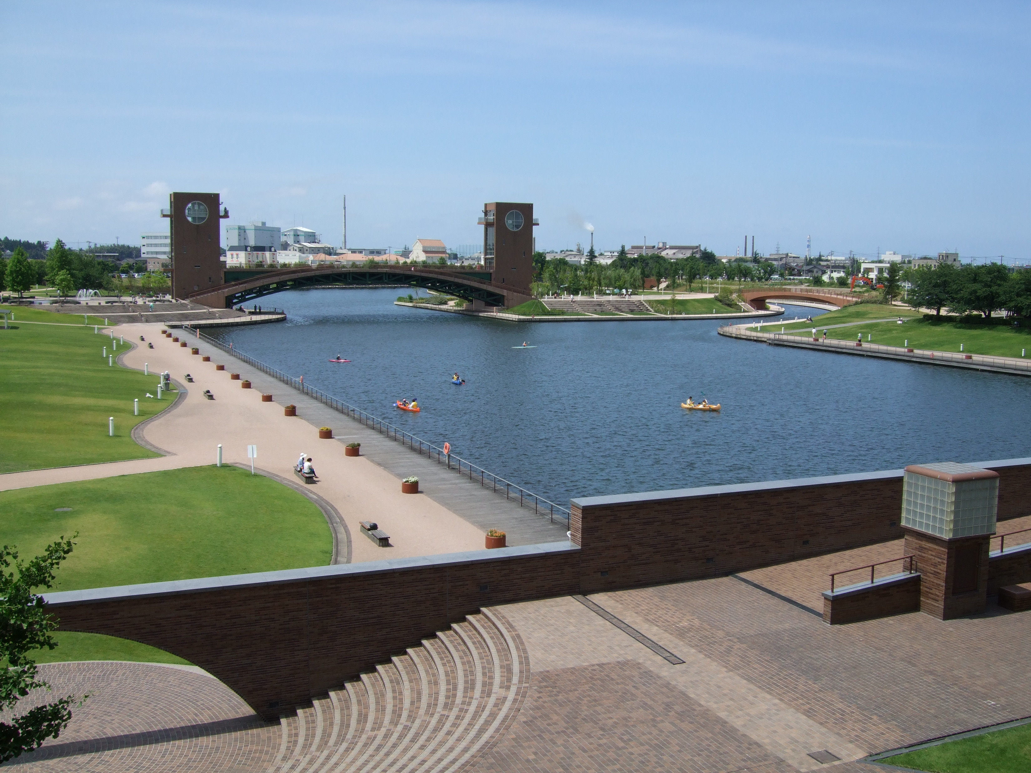 Fugan-unga Kansui Park in Toyama Japan (富岩運河環水公園) 隣接する富山市総合体育館より撮影